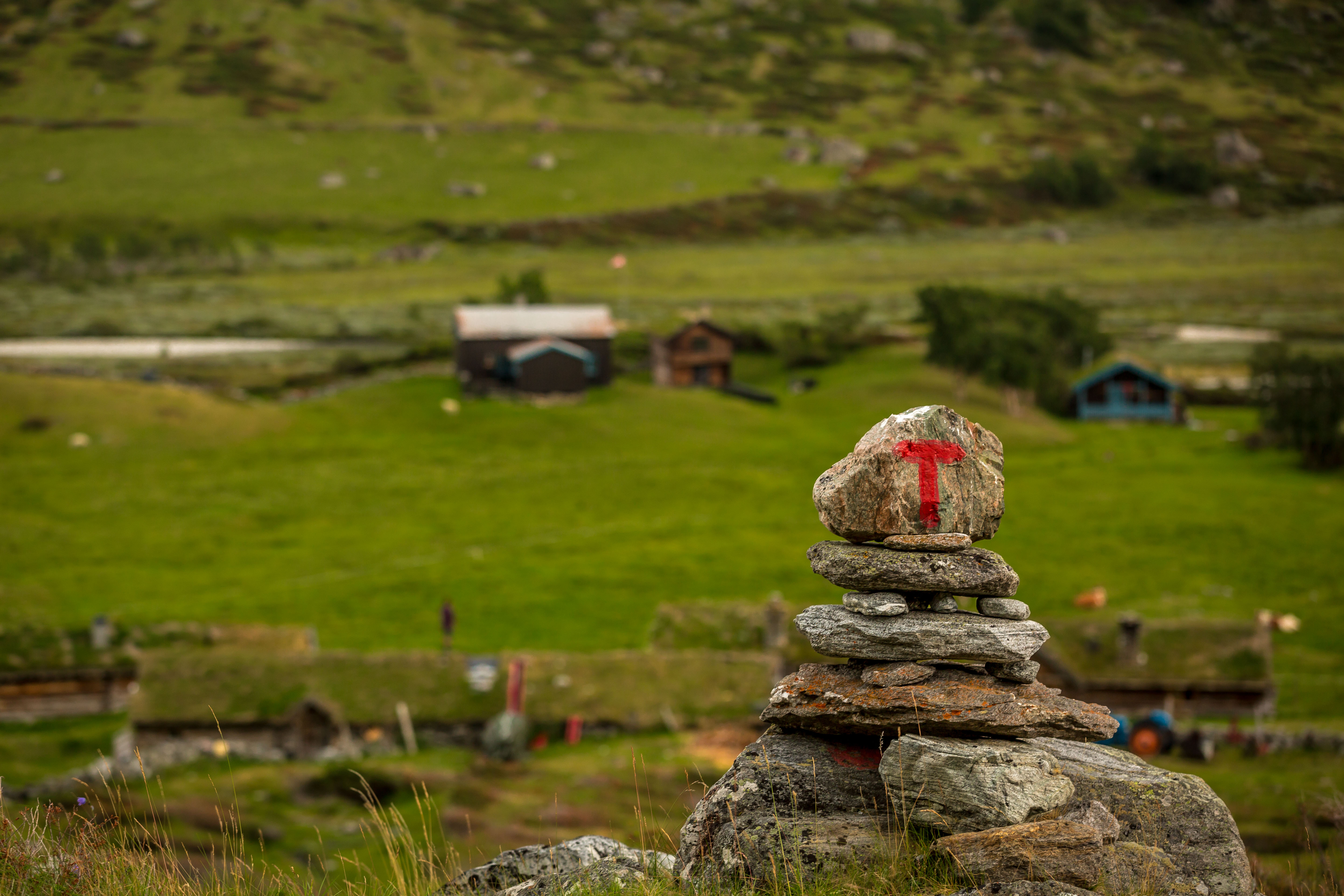 Hytte drevet av Kristiansund og Nordmøre Turistforening. Foto: Roar Halten